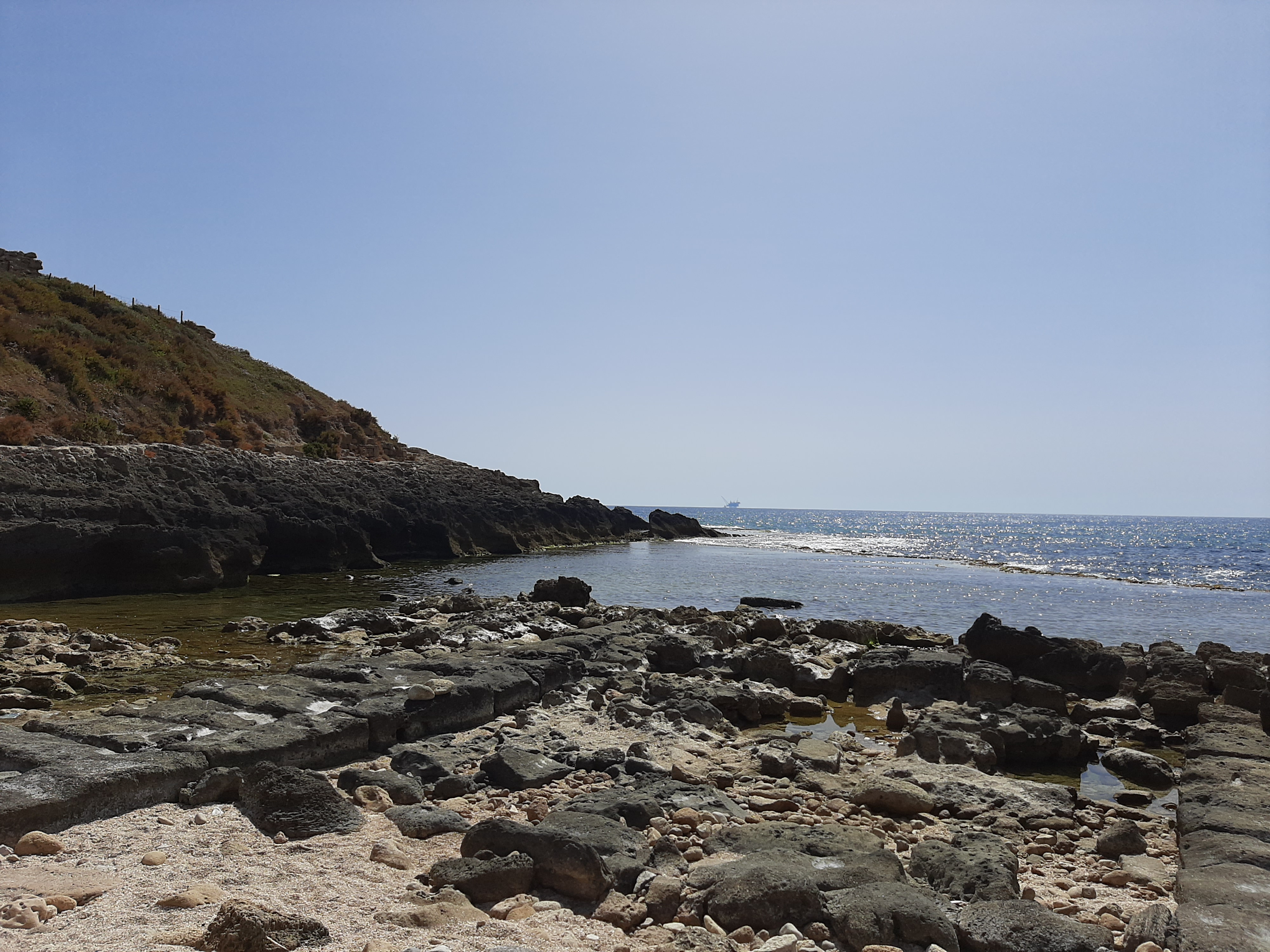 صورة لآثار في شاطئ خربة البرج في فلسطين بالقرب من الطنطورة - الصورة التقتها بنفسي